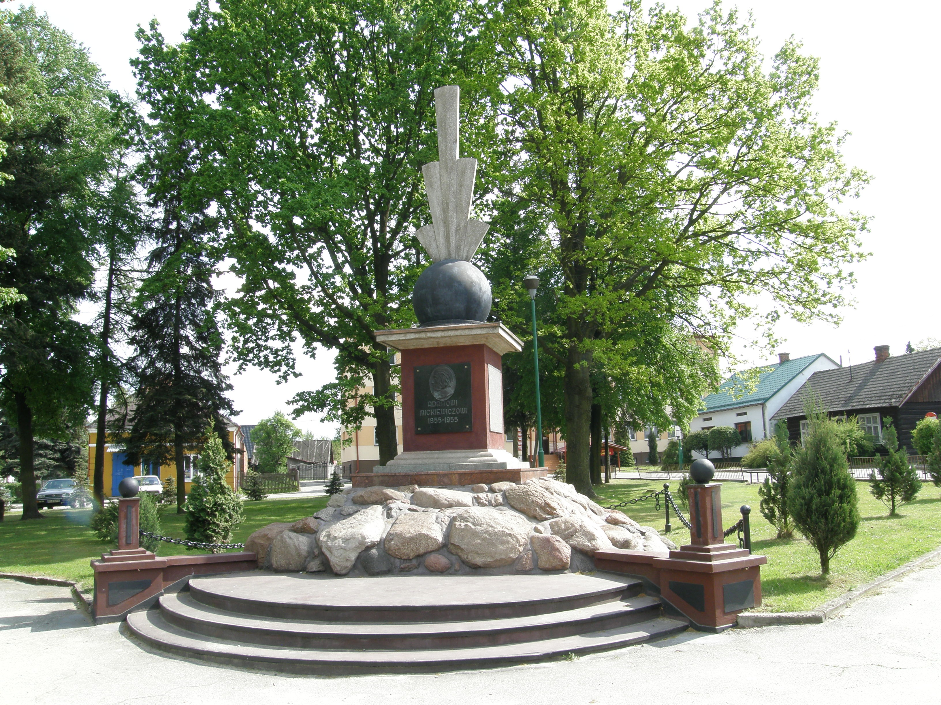 Żołynia, skwer przy ul. Mickiewicza - monument upamiętniający Adama Mickiewicza